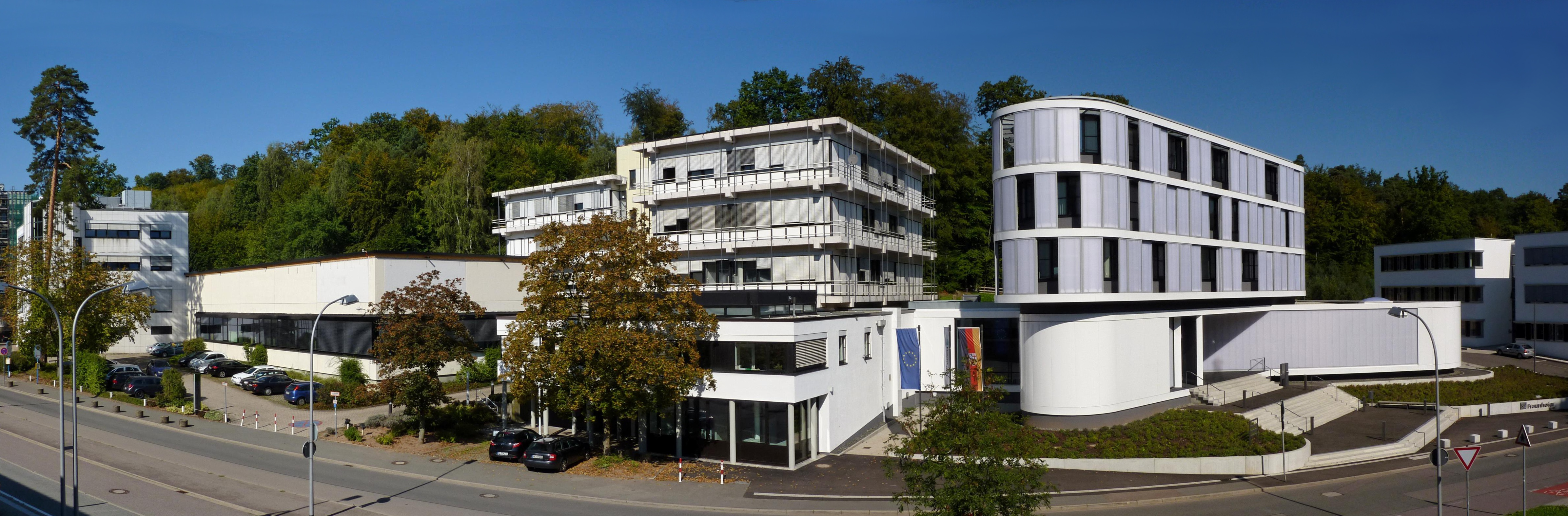 Fraunhofer IZFP